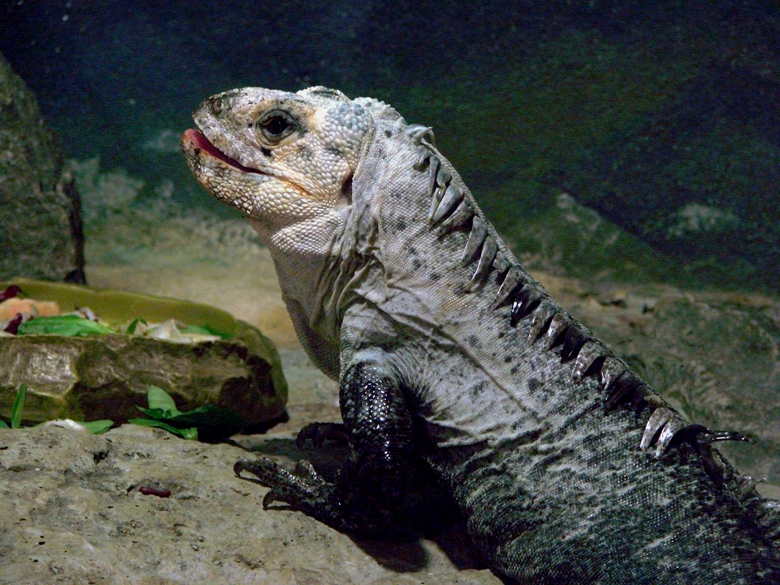 Iguane d'Utila (Ctenosaura bakeri), zoo d'Amnéville.